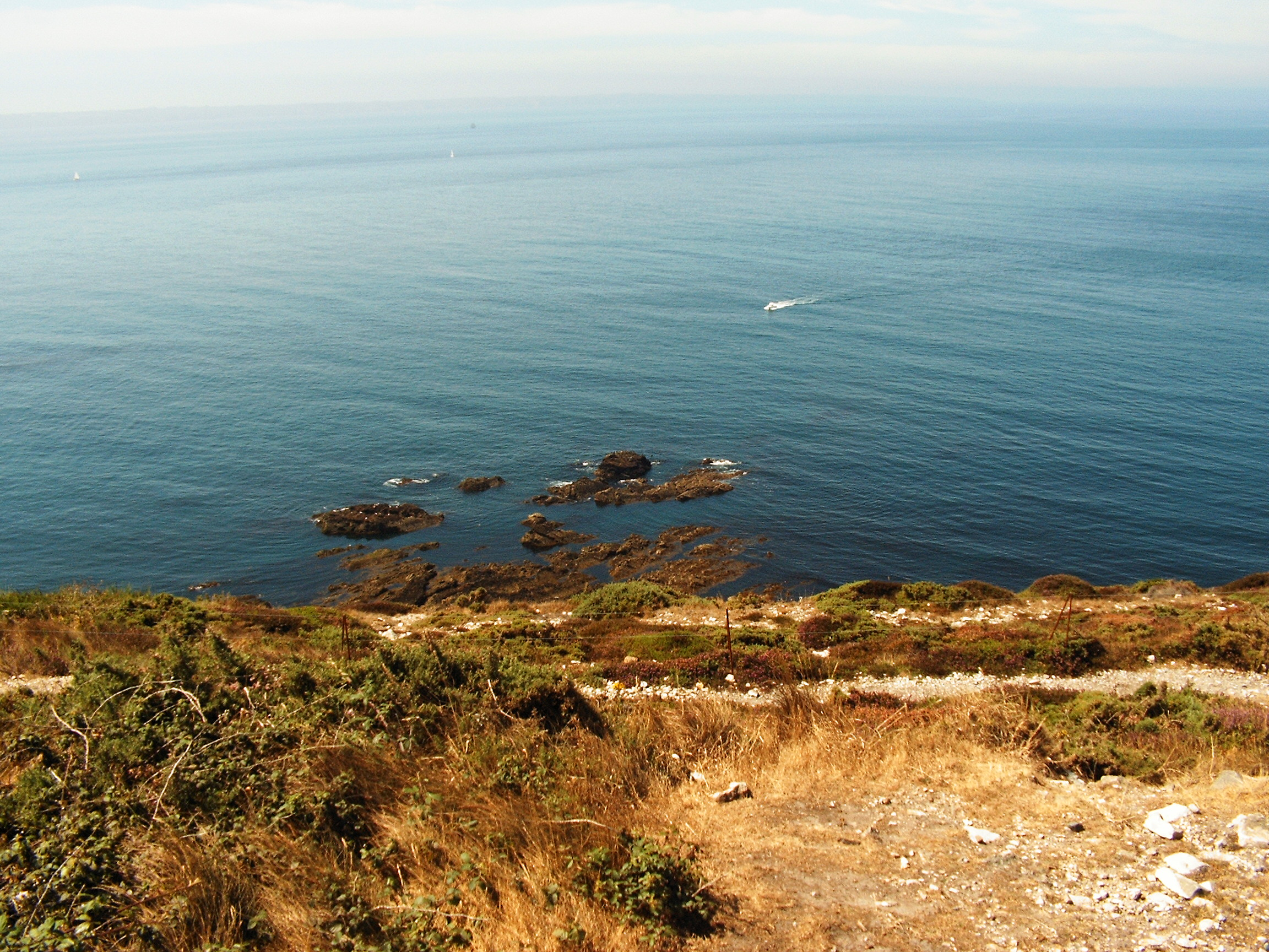 Blick vom Cap de la Chevre auf der Halbinsel Crozon in der Bretagne